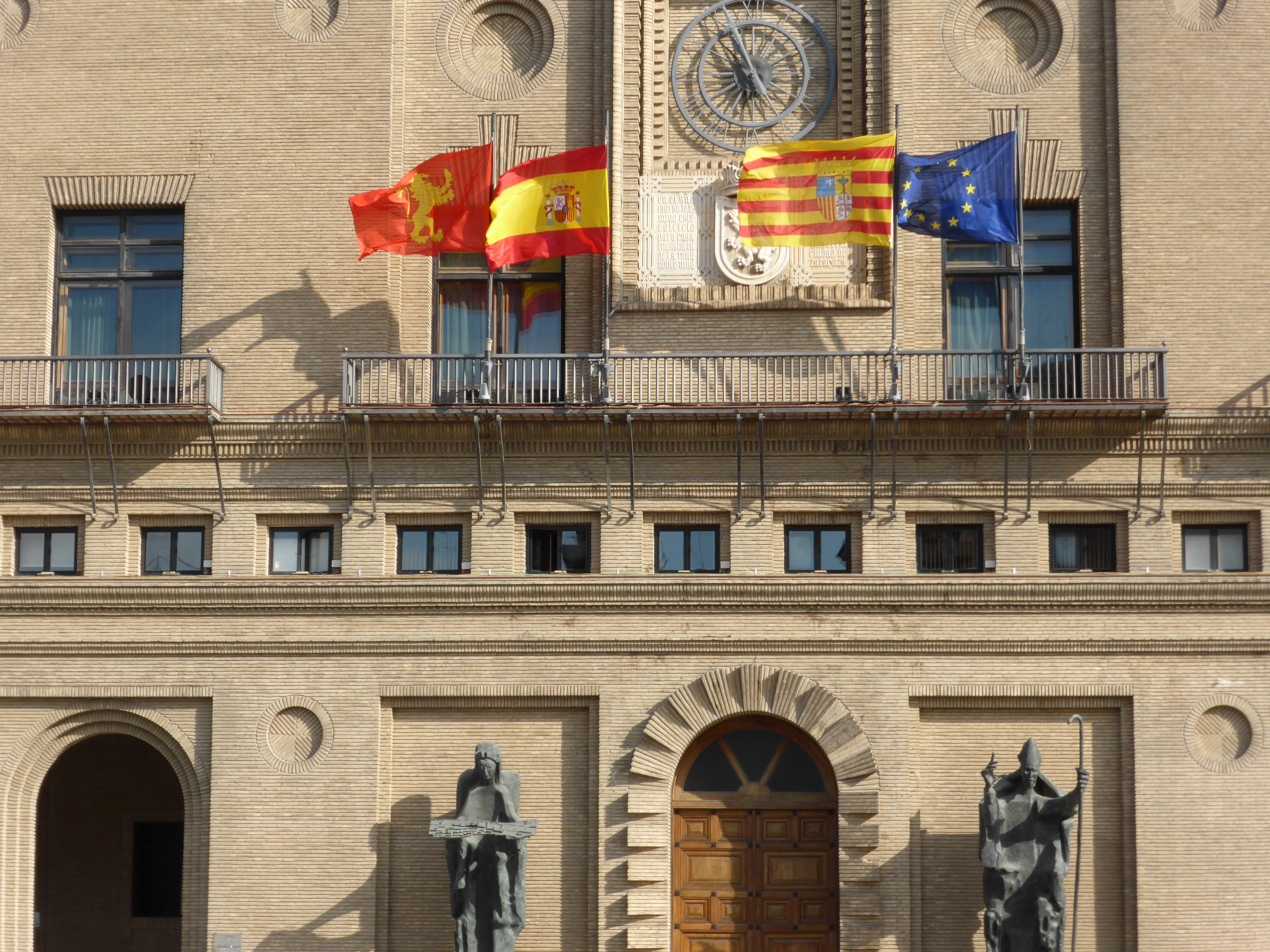 El actual edificio del Ayuntamiento de Zaragoza (España) fue construido a mediados del siglo XX, en la Plaza del Pilar, junto a la Basílica de Nuestra Señora del Pilar. En el balcón principal del Ayuntamiento ondean las banderas de la ciudad de Zaragoza, España, la Comunidad Autónoma de Aragón y la Unión Europea.